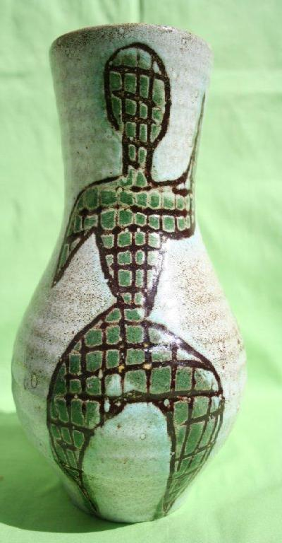 Vase à décor antropomorphe, Accolay, France